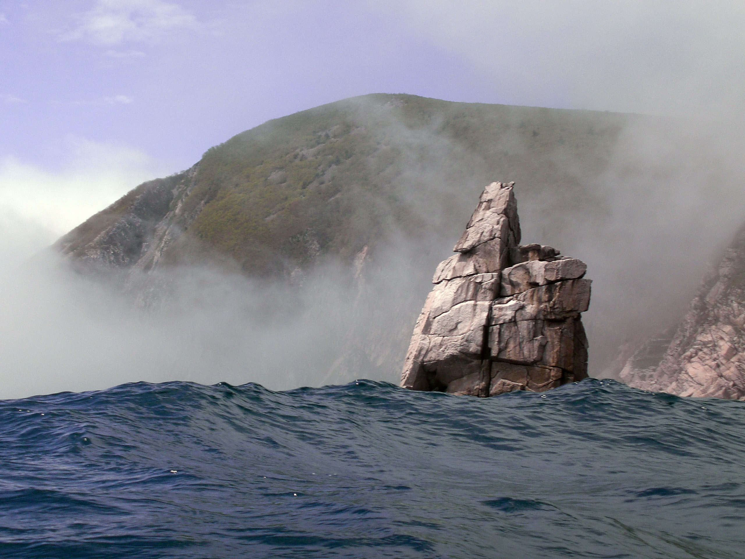 Кекур у скалистых берегов